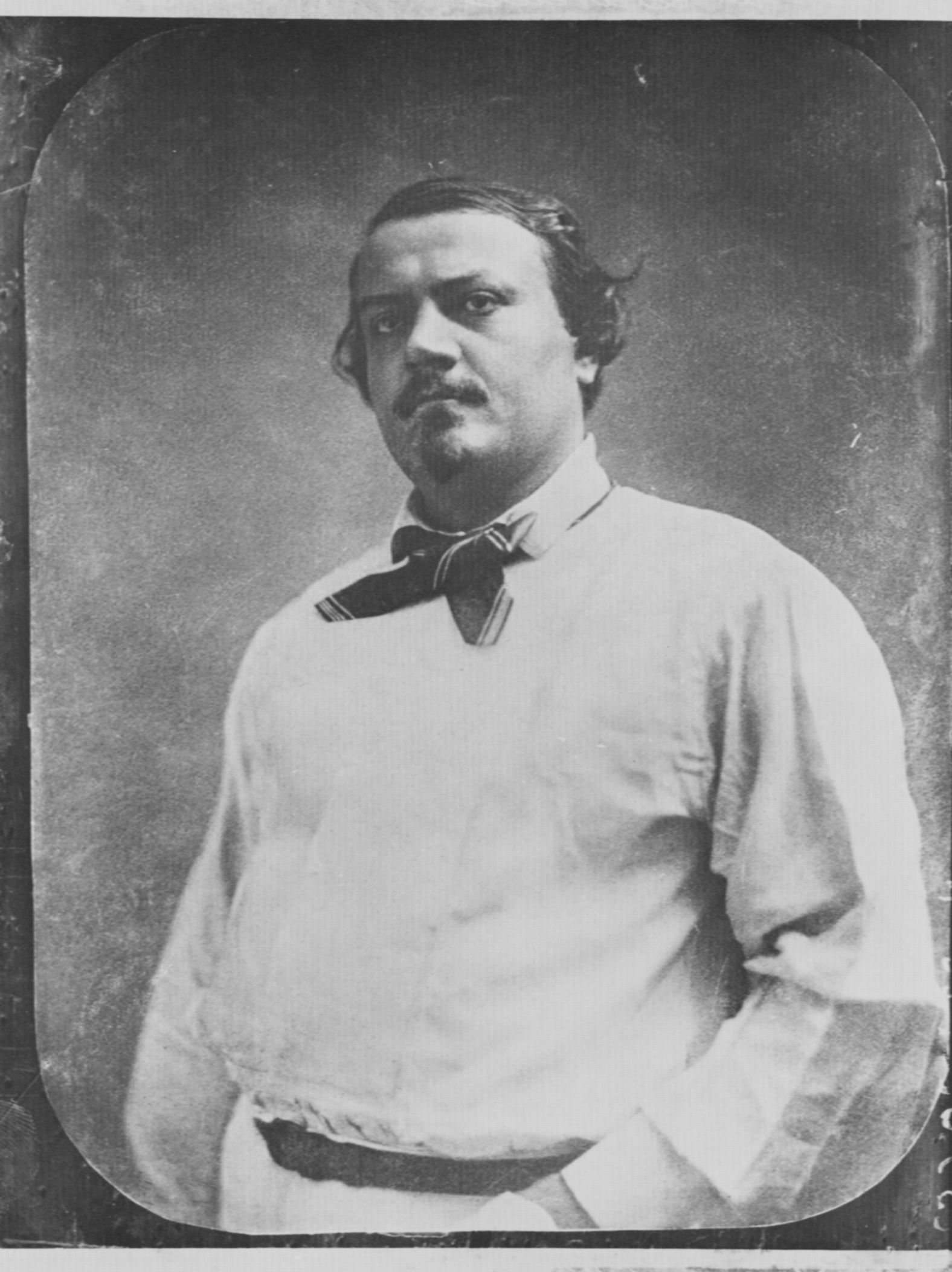 Tournachon, Gaspard-Félix: Joseph Darcier (1820-1883)